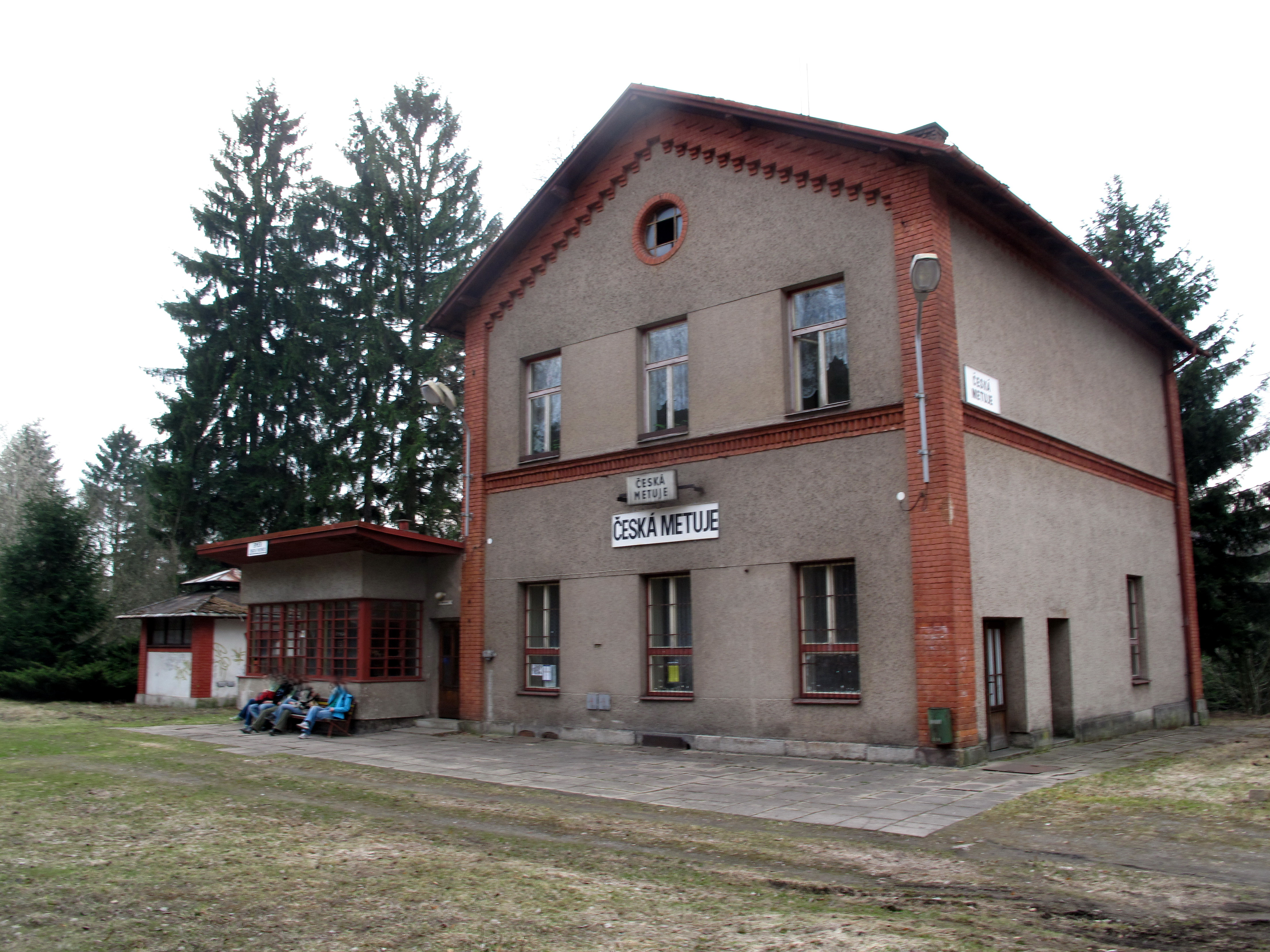 Česká Metuje, železniční stanice